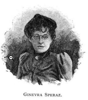 Immagine in controguardia